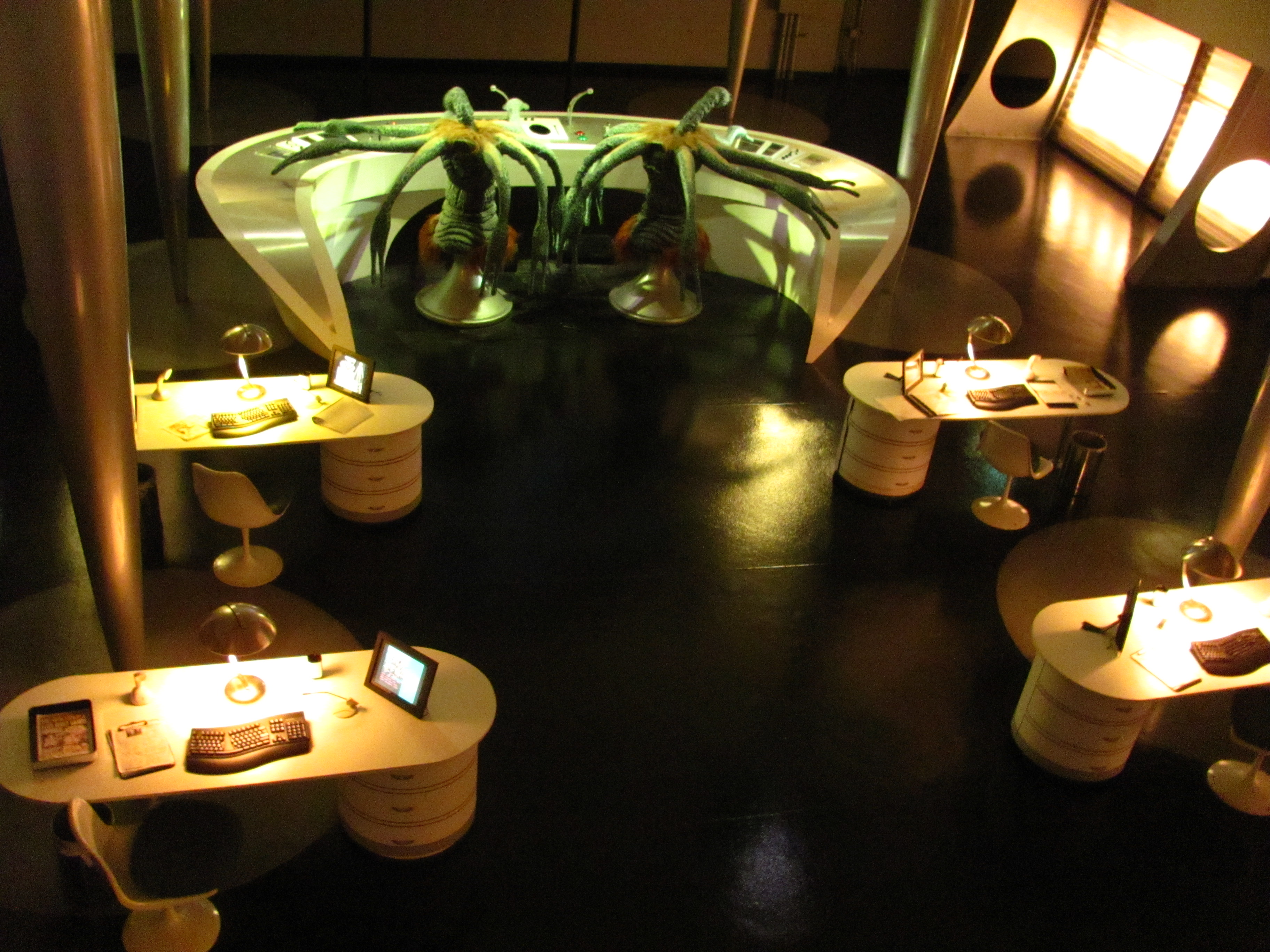 Men in Black: Alien Attack